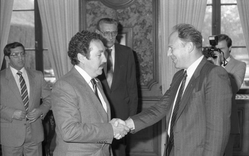 11.-15.10.1986 Besuch des Präsidenten von Guatemala, Lic. Marco Vinicio Cerezo Arévalo, und seiner Frau Lic. Raquel Blandon De Cerezo in der Bundesrepublik Deutschland. Gespräch mit Dr. Jürgen Warnke - Bundesministerium für wirtschaftliche Zusammenarbeit und Entwicklung